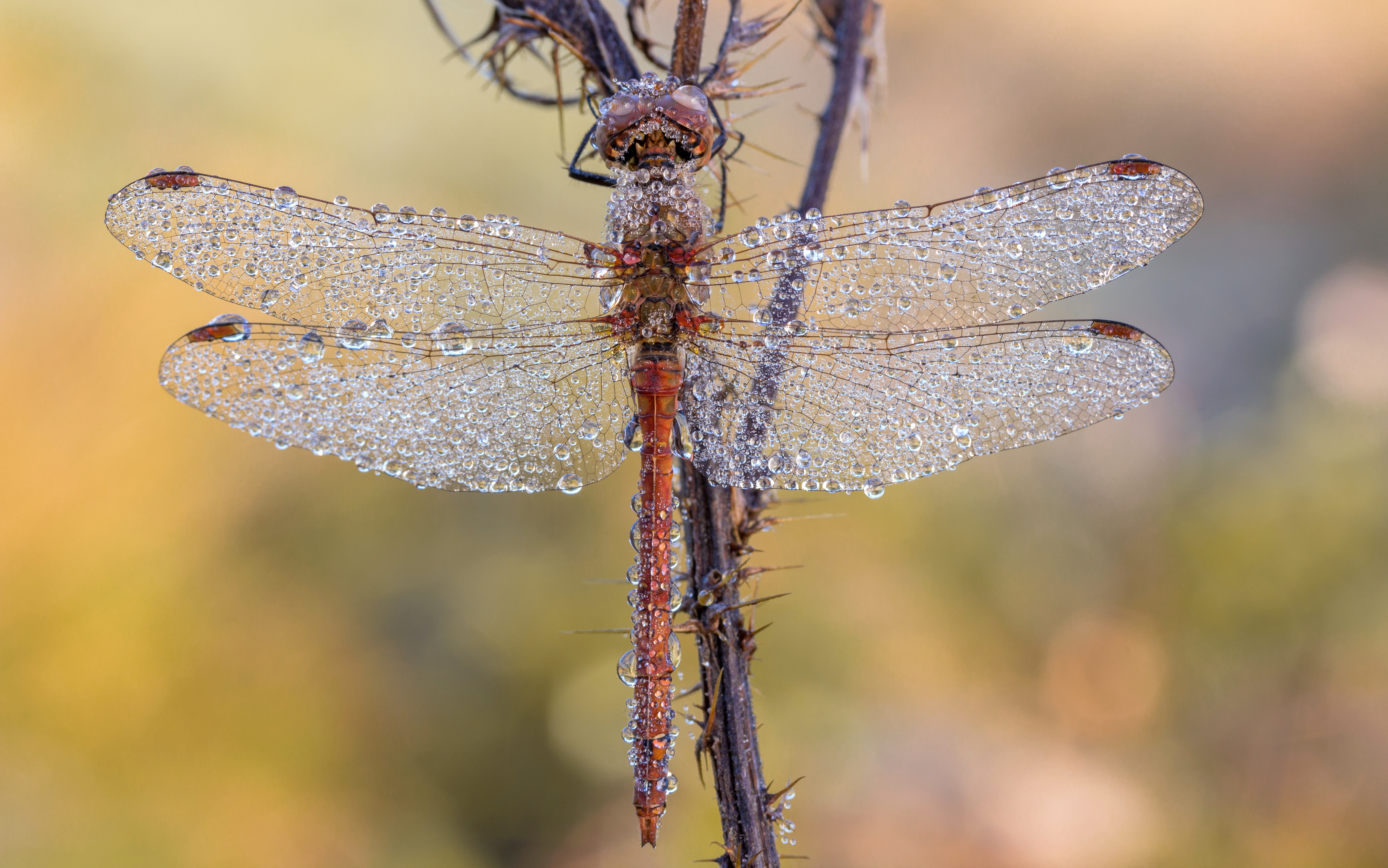 Heidelibelle im Morgengrauen